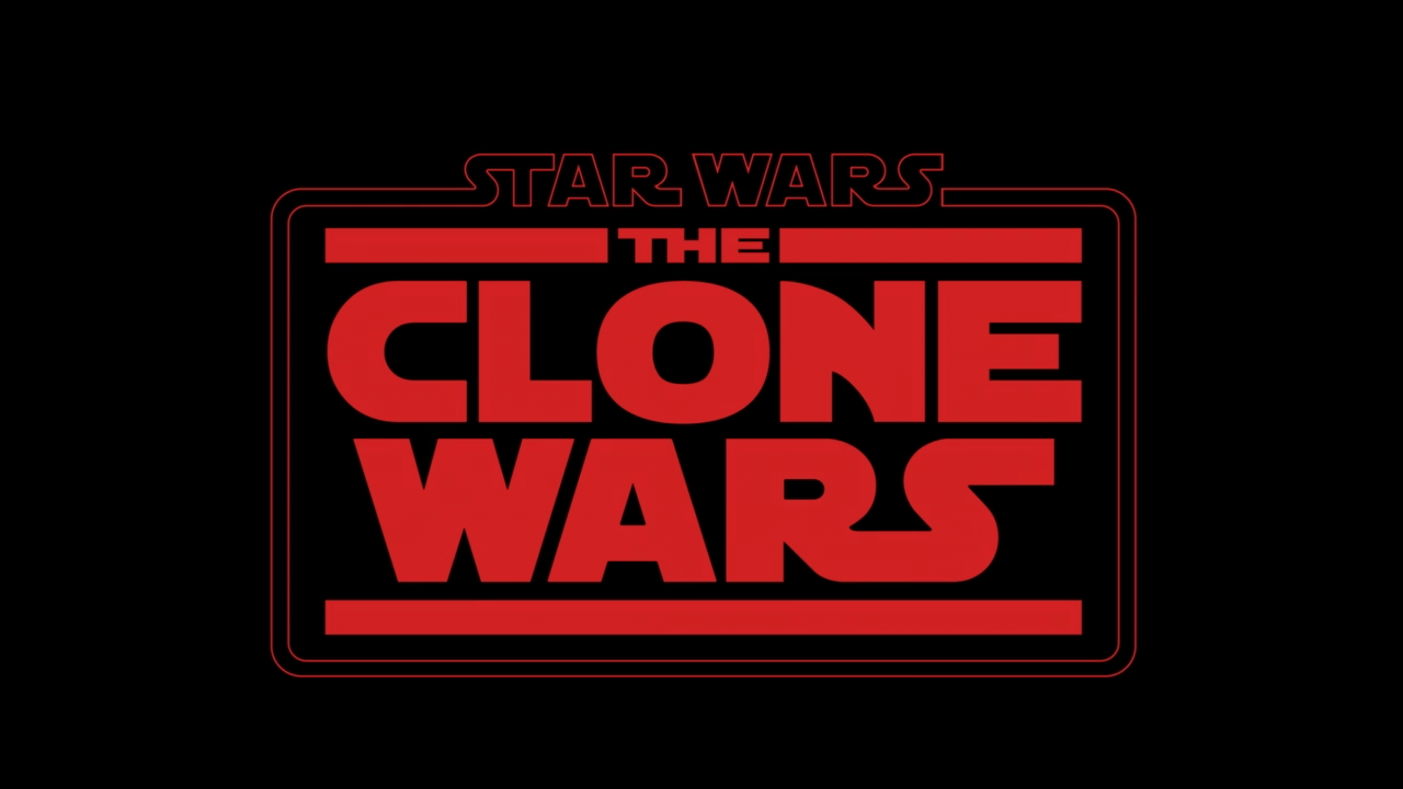 Logo usato nei titoli di testa degli ultimi quattro episodi della settima stagione della serie animata Star Wars: The Clone Wars.